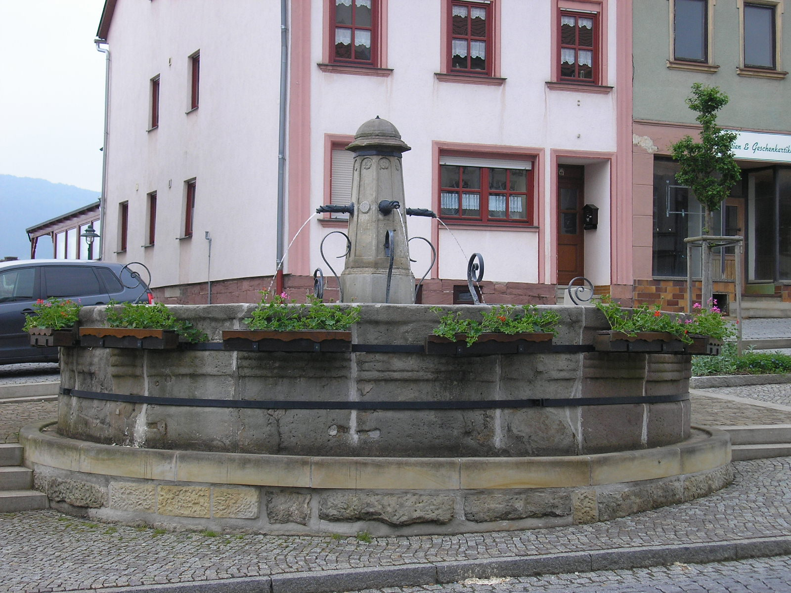 Marktbrunnen in Geisa (Rhön).